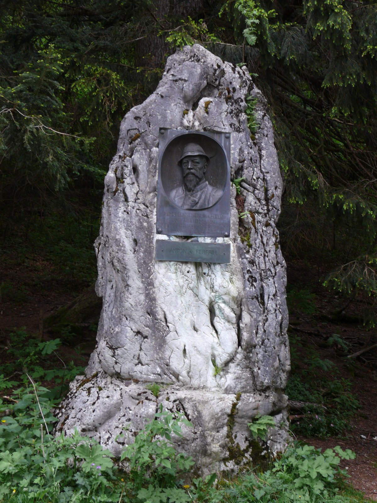 Denkmal für den bayerischen Heimat- und Jagdschriftsteller Anton von Perfall (1853-1912) am Seeweg in Spitzingsee, Markt Schliersee, Landkreis Miesbach, Bezirk Oberbayern, Bayern. Als Baudenkmal in der Bayerischen Denkmalliste aufgeführt. Laut Denkmalliste errichtet im Jahr 1912.